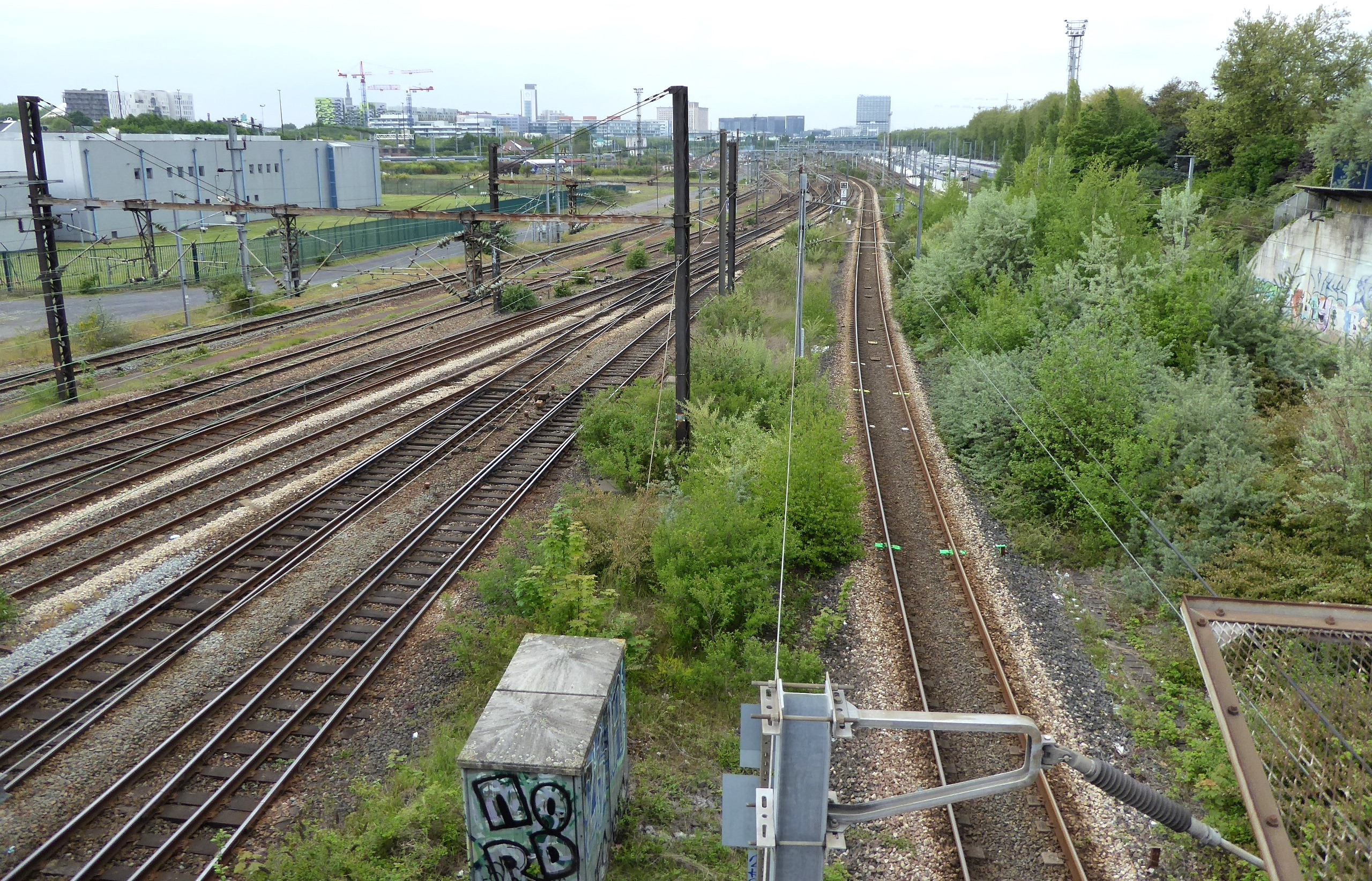 Voies ferrées vues du pont de Tournai ancien dépôt de Fives